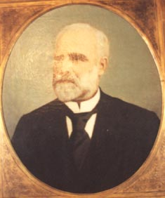 Obra da coleção Brasiliana Iconográfica.